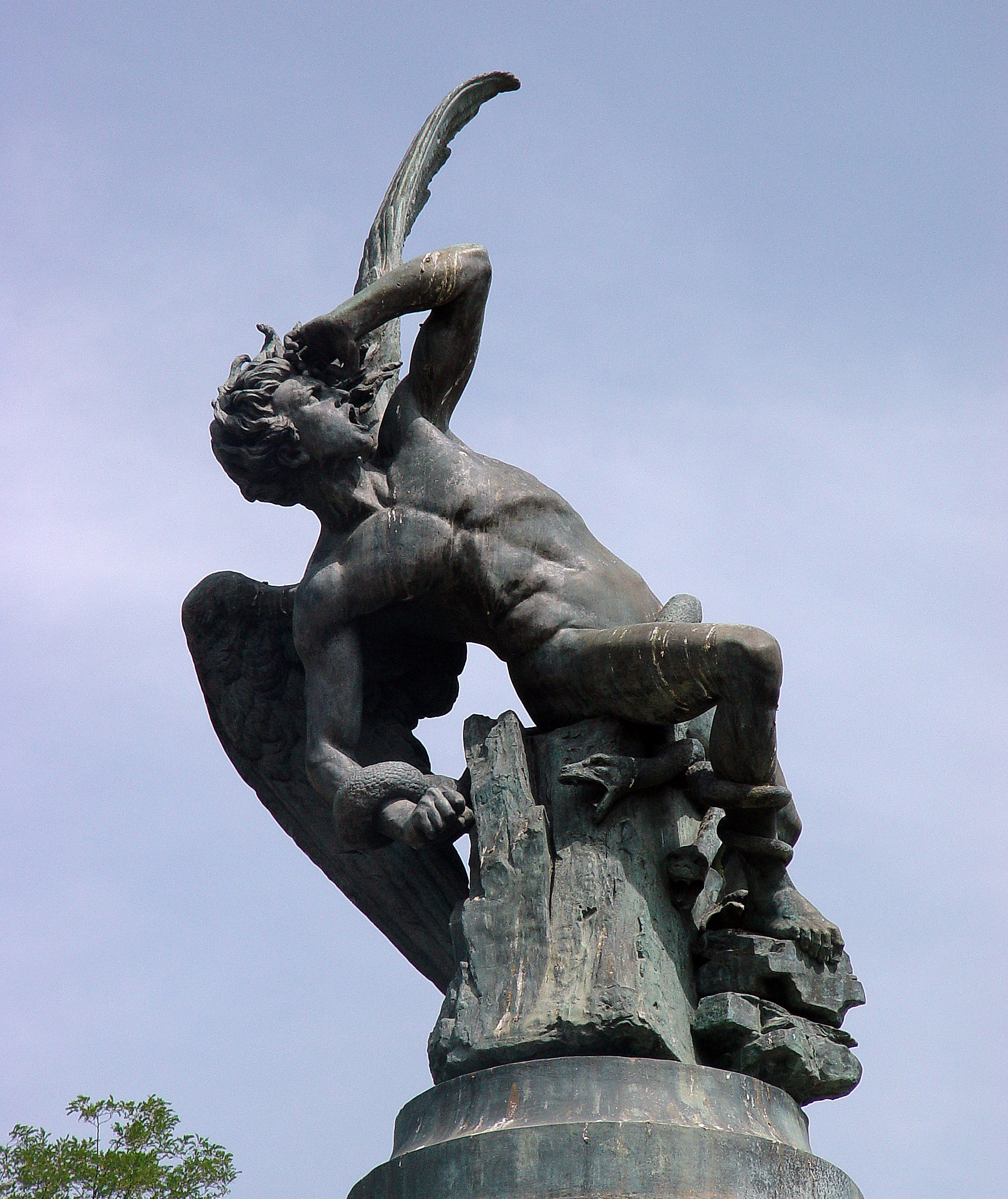 Esta estatua al Ángel Caído es la única estatua del mundo dedicada al diablo y está en pleno Parque de El Retiro en Madrid. Fue erigida en 1874 por iniciativa del duque Fernán Núñez ignorando las protestas de la sociedad de la época. Donó «11.000 duros» para el proyecto.